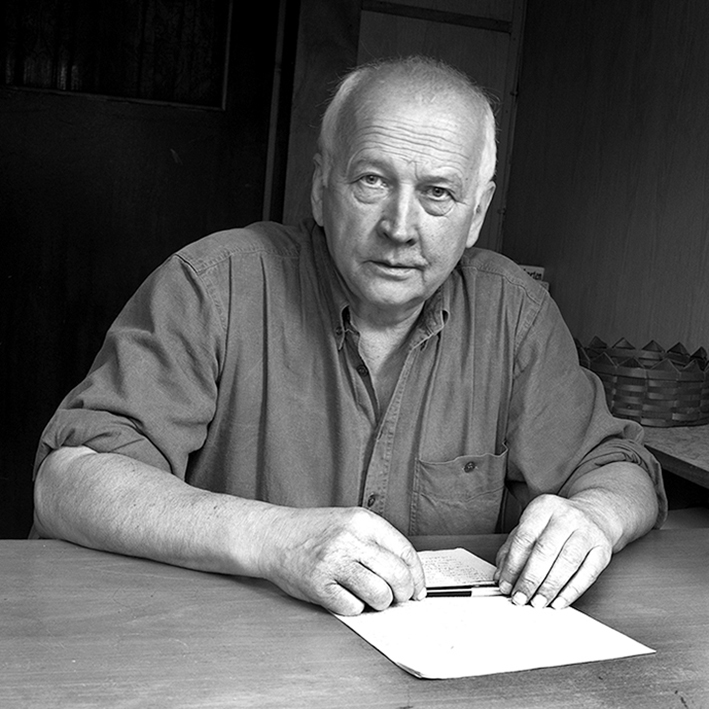 Henryk Bereska am Schreibtisch seines Rückzugsortes Kolberg/Mark Brandenburg